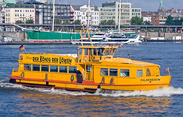 HADAG-Fähre MS Falkenstein unterwegs auf der Hafenfährlinie 75 Landungsbrücken–Steinwerder. Im Hintergrund ist die Rickmer Rickmers zu sehen.